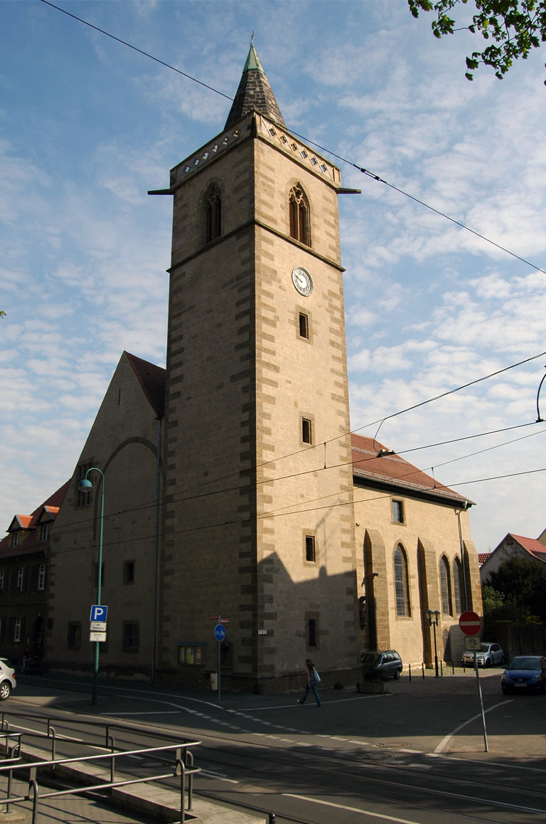 Andreaskirche (errichtet Anfang des 13. Jahrhunderts) an der Ecke Andreasstraße/Webergasse in Erfurt